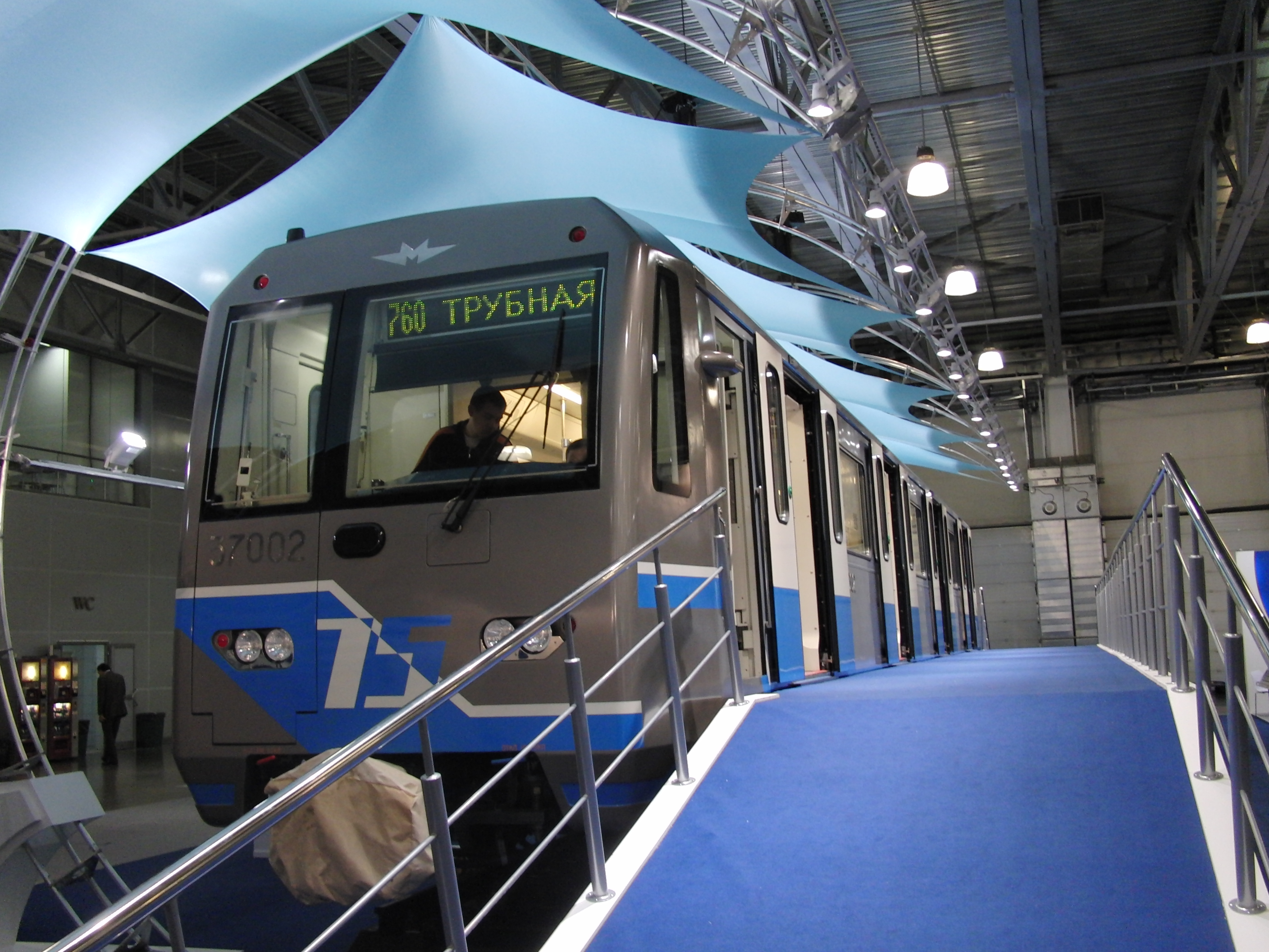 Вагон типа 81-760 на выставке «Экспосититранс» 2010.